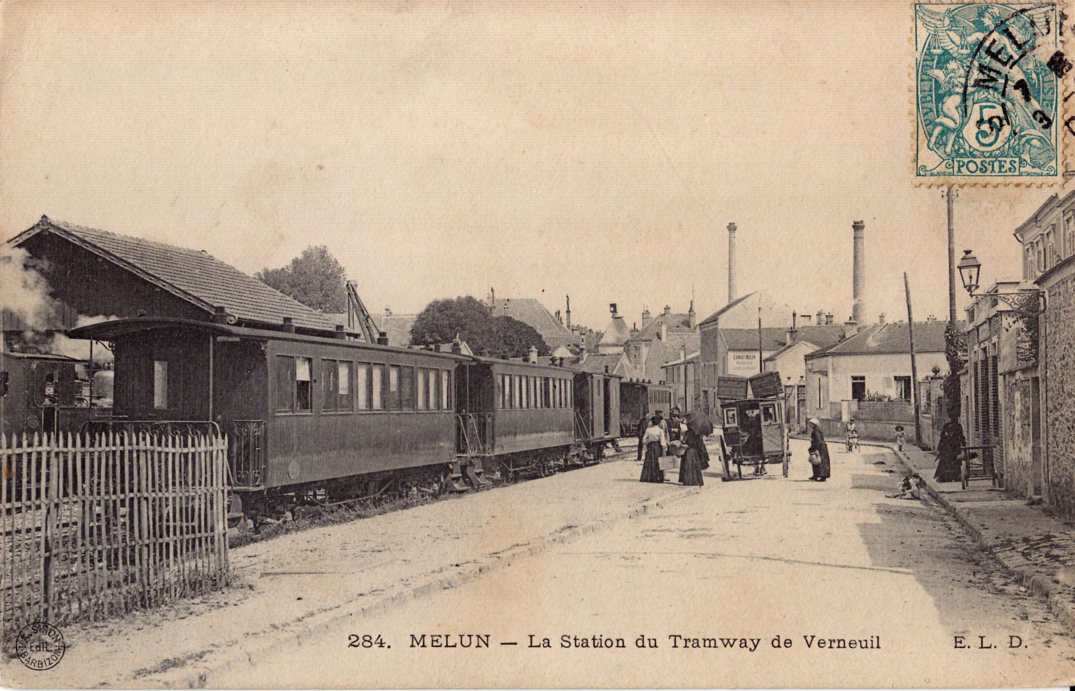 Carte postale ancienne éditée par ELD, n°284 :MELUN - La Station du Tramway de Verneuil